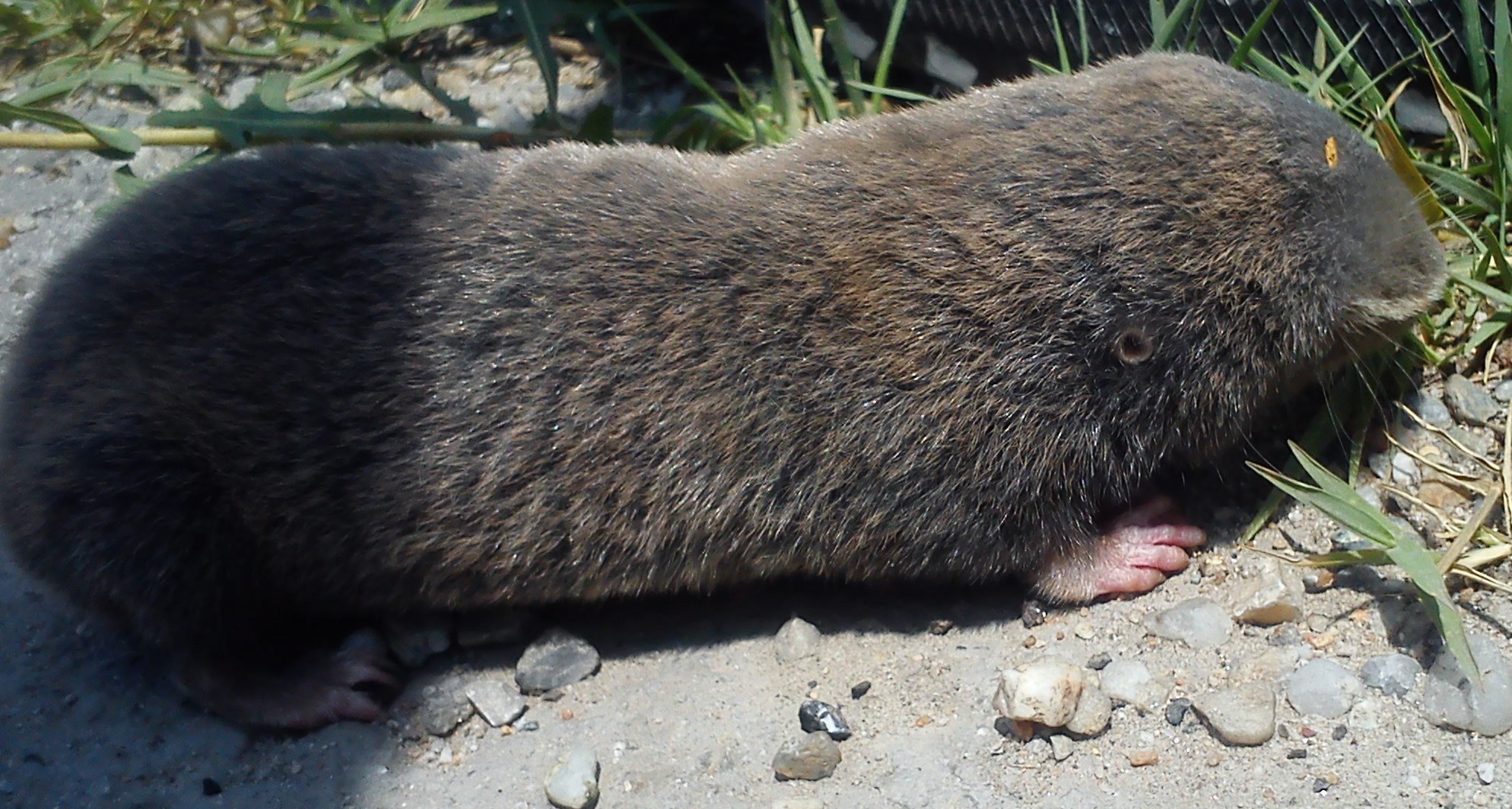 Слепо Куче (Spalax Leucodon) фотографирано на патот помеѓу Прилеп и с. Мажучиште.